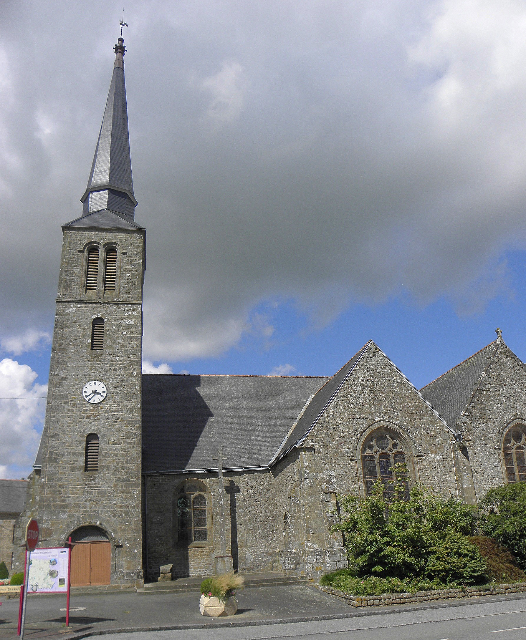 Église saint-Crépin et Saint-Crépinien de Larchamp (53). Clocher et flanc sud.